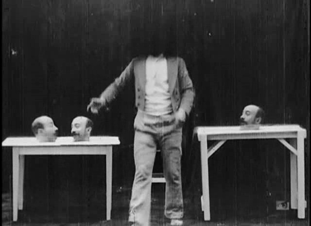 Méliès, Un homme de têtes (Star Film 167 1898)